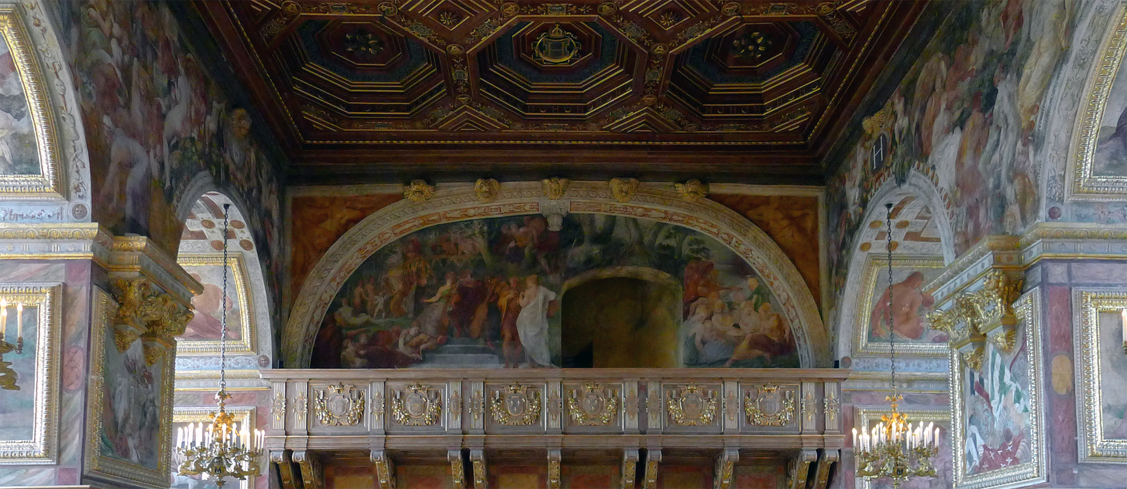 Château de Fontainebleau .